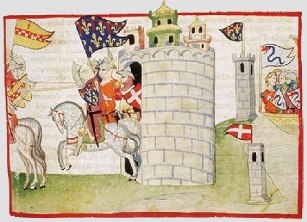 Villaniho kronika